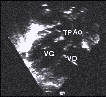 Vaisseaux parallèles (voie sous costale) TGV